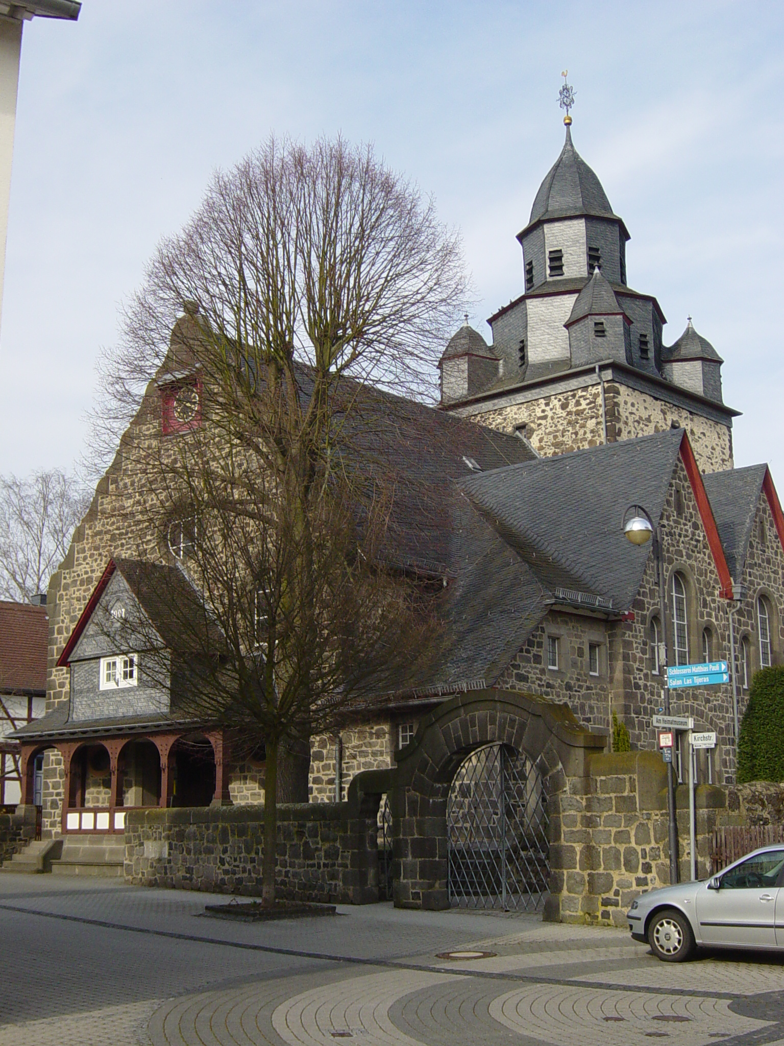 Kirche in Leihgestern, Ortsteil von Linden (Hessen), Westansicht mit mit Eingangshalle und Tor